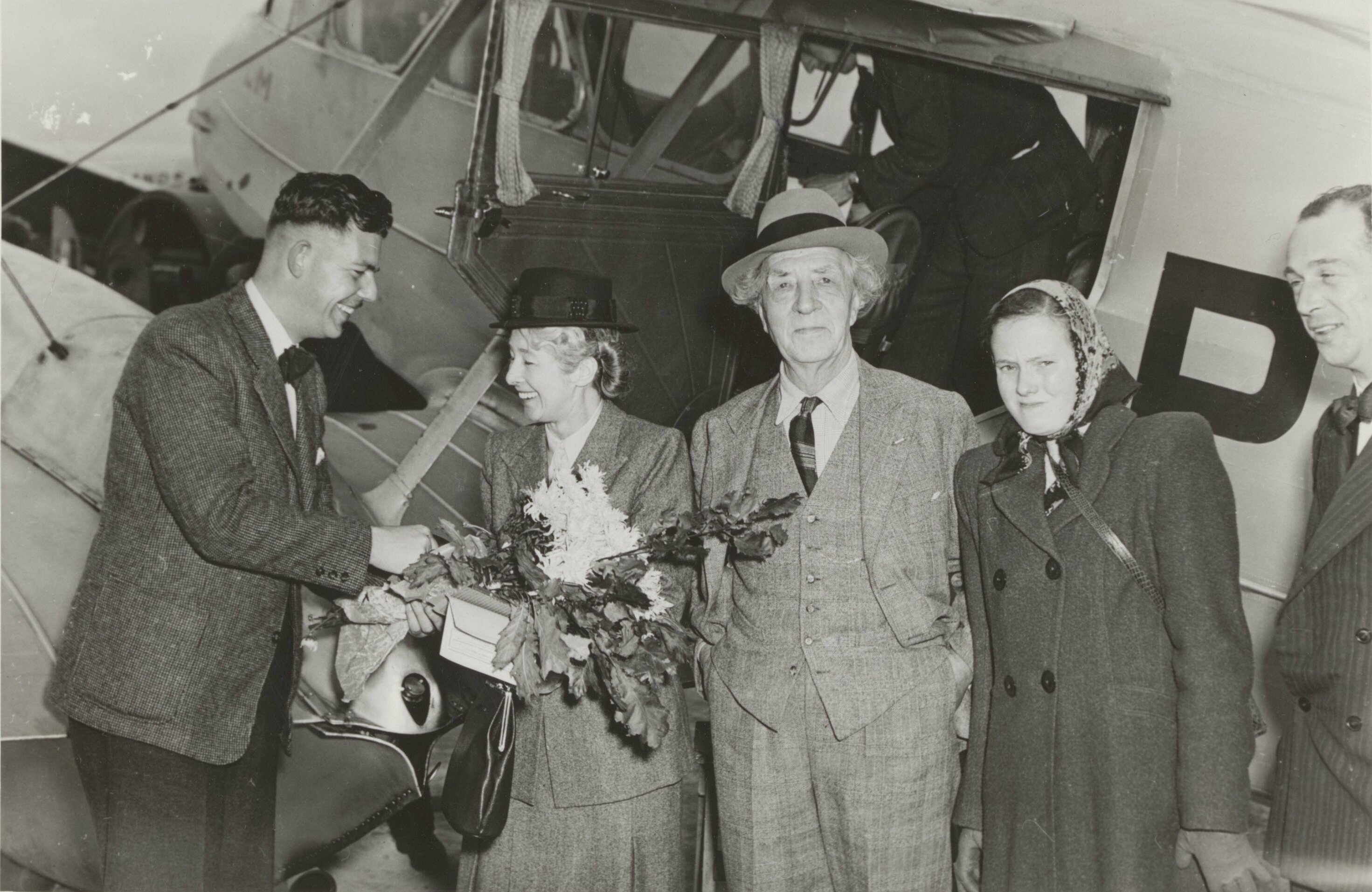 Collectie / Archief : Fotocollectie Elsevier Reportage / Serie : [ onbekend ] Beschrijving : Schrijver Johan Fabricius en echtgenote vertrekken met een KLM-vliegtuig naar het noorden van het land alwaar hij gehuldigd zal worden t.g.v. zijn 75ste verjaardag. Vlnr. De heer v.d. Dam van het Huldiginscomité biedt hier bloemen aan mevr. Fabricius, daarnaast Jan Fabricius en een familielid Datum : 25 september 1946 Locatie : Noord-Holland, Schiphol Trefwoorden : auteurs, letterkunde, schrijvers, vertrekken, vliegtuigen Persoonsnaam : Dam van der, Fabricius Johan Fotograaf : Vrind, Luuk / Anefo Auteursrechthebbende : Nationaal Archief Materiaalsoort : Foto (zwart/wit) Nummer archiefinventaris : bekijk toegang 2.24.05.02 Bestanddeelnummer : 093-1376